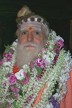 Satguru Sivaya Subramuniyaswami (Gurudeva) wearing Guru garlands.